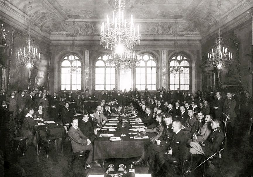 Pierwsze posiedzenie plenarne; przy stole po lewej stronie – delegacja rosyjska, po prawej delegacja polska ze Stanisławem Grabskim na czele.